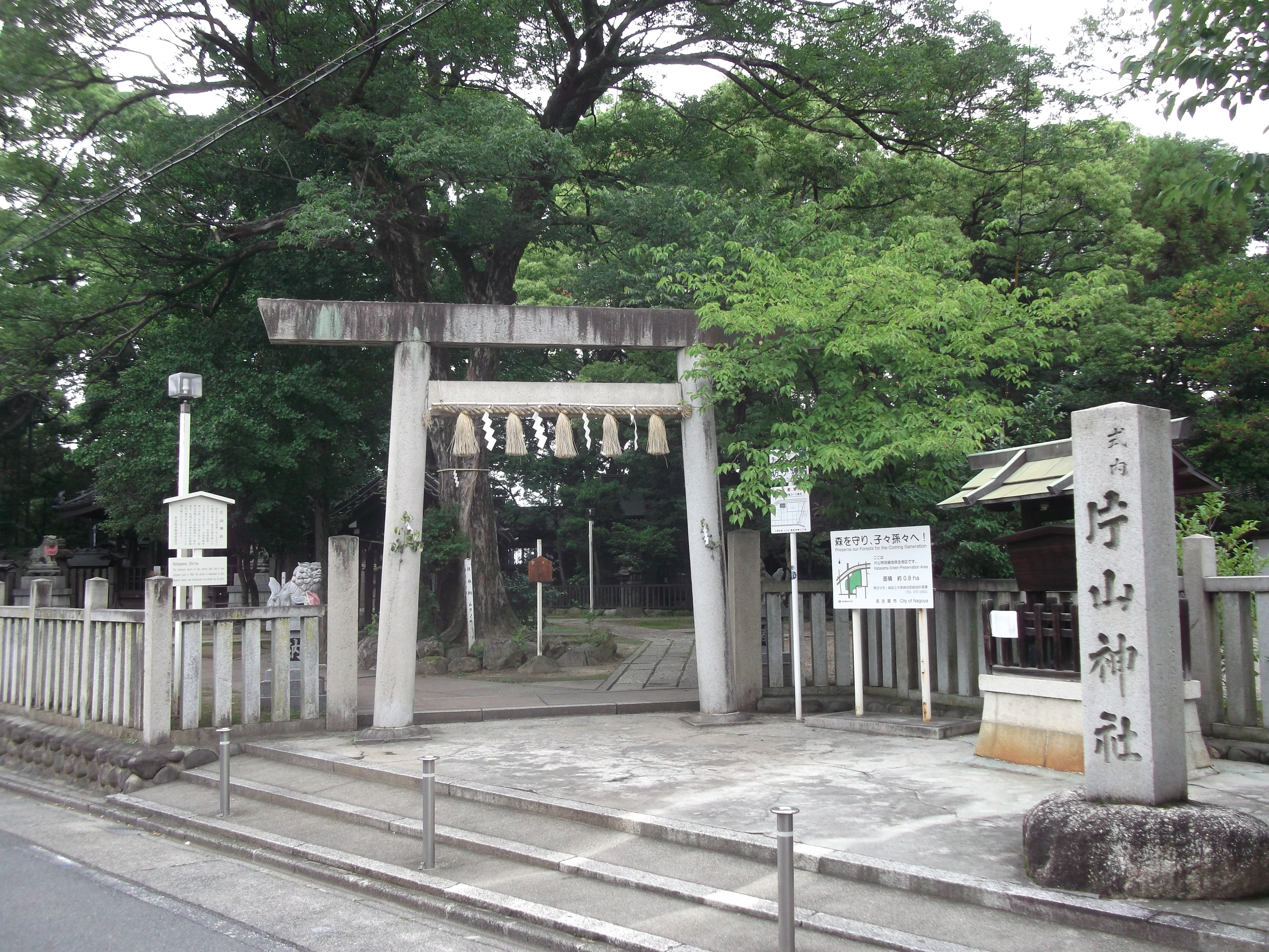 名古屋市東区芳野の片山神社を南側公道東側より撮影